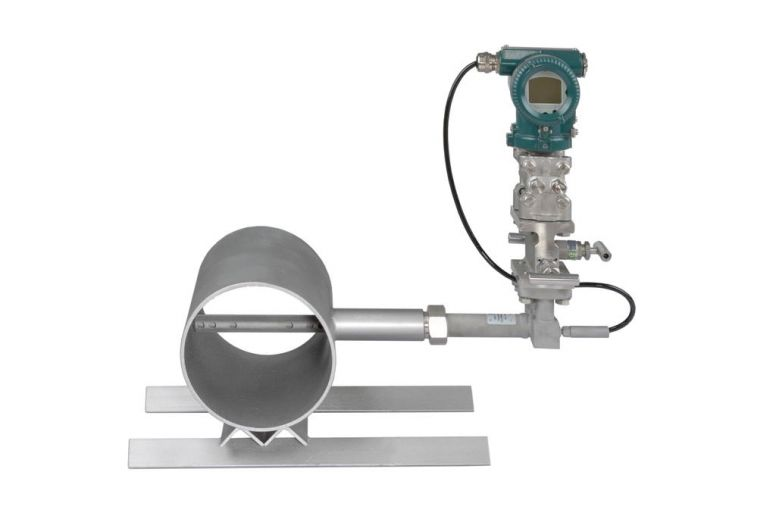 integrierende Staudrucksonde mit multivariablem Messumformer